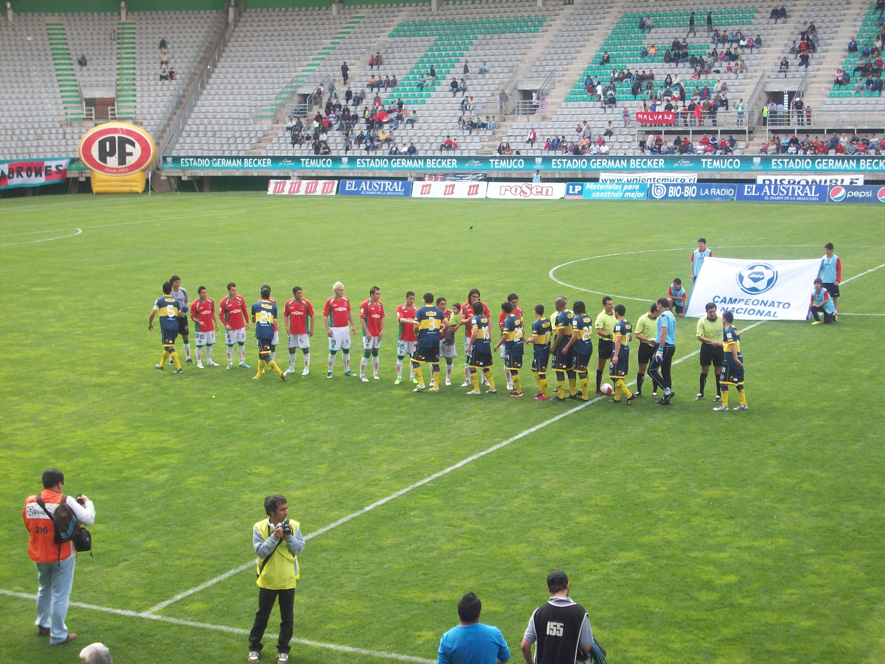 Unión Temuco y Everton enfrentándose en un partido correspondiente a la Primera B del fútbol chileno, en el Estadio Germán Becker.